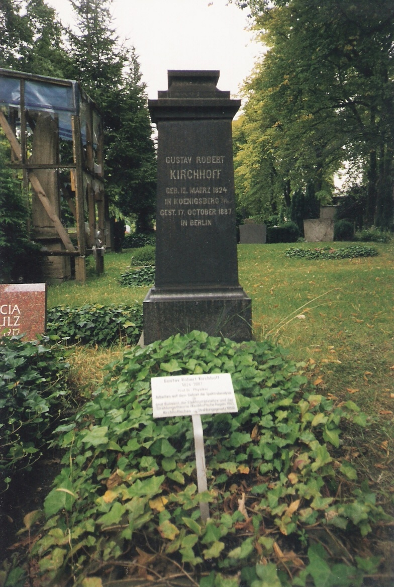 Sepultura de Gustav Robert Kirchhoff em Berlin, Alemanha